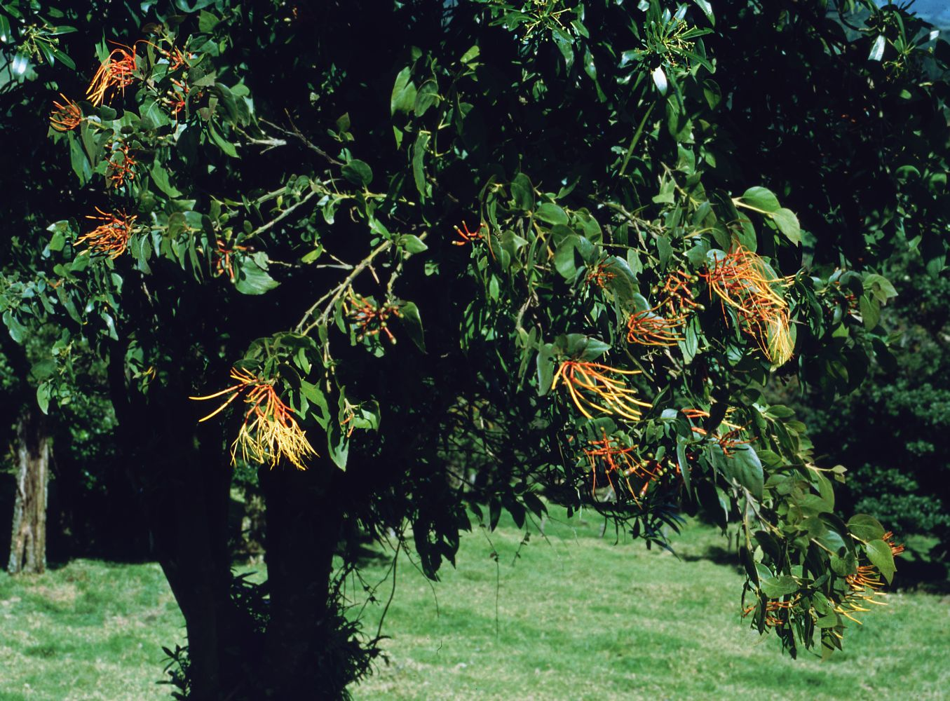 Psittacanthus schiedeanus, Riemenblumengewächse (Loranthaceae), auf Drimys granadensis, Winteraceae – Costa Rica: Prov. Alajuela, Cordillera Central, Südhand des Volcán Poás W Poasito